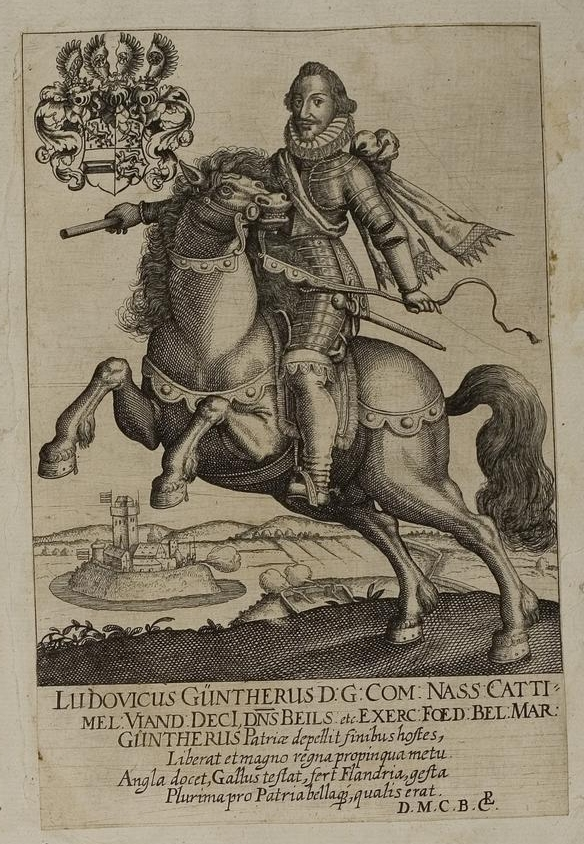 Grafik aus dem Klebeband Nr. 1 der Fürstlich Waldeckschen Hofbibliothek Arolsen Motiv: Ludwig Günther von Nassau